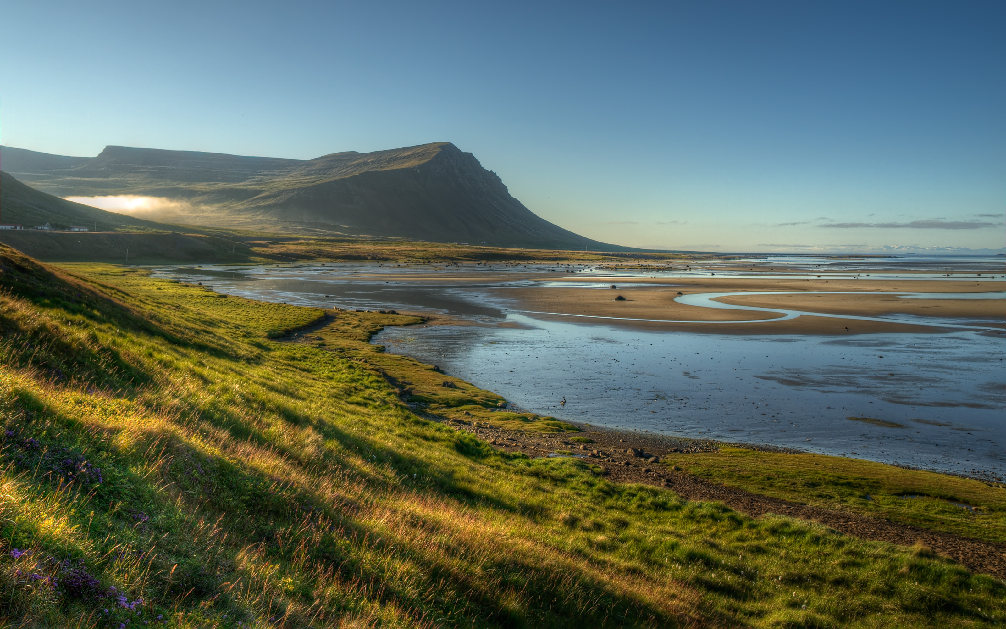 Hamarshyrna